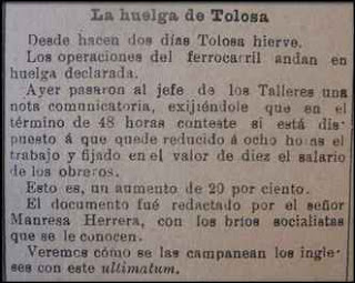 Diario el Mercurio 8 de agosto de 1896, descripción de la huelga ferroviaria de Tolosa